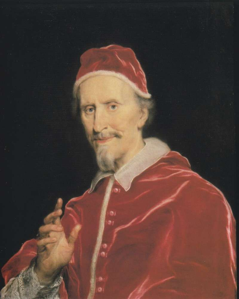 Pope Clement IX c.1667/69 Galleria Nazionale d'Arte Antica a Palazzo Corsini Rome Italy